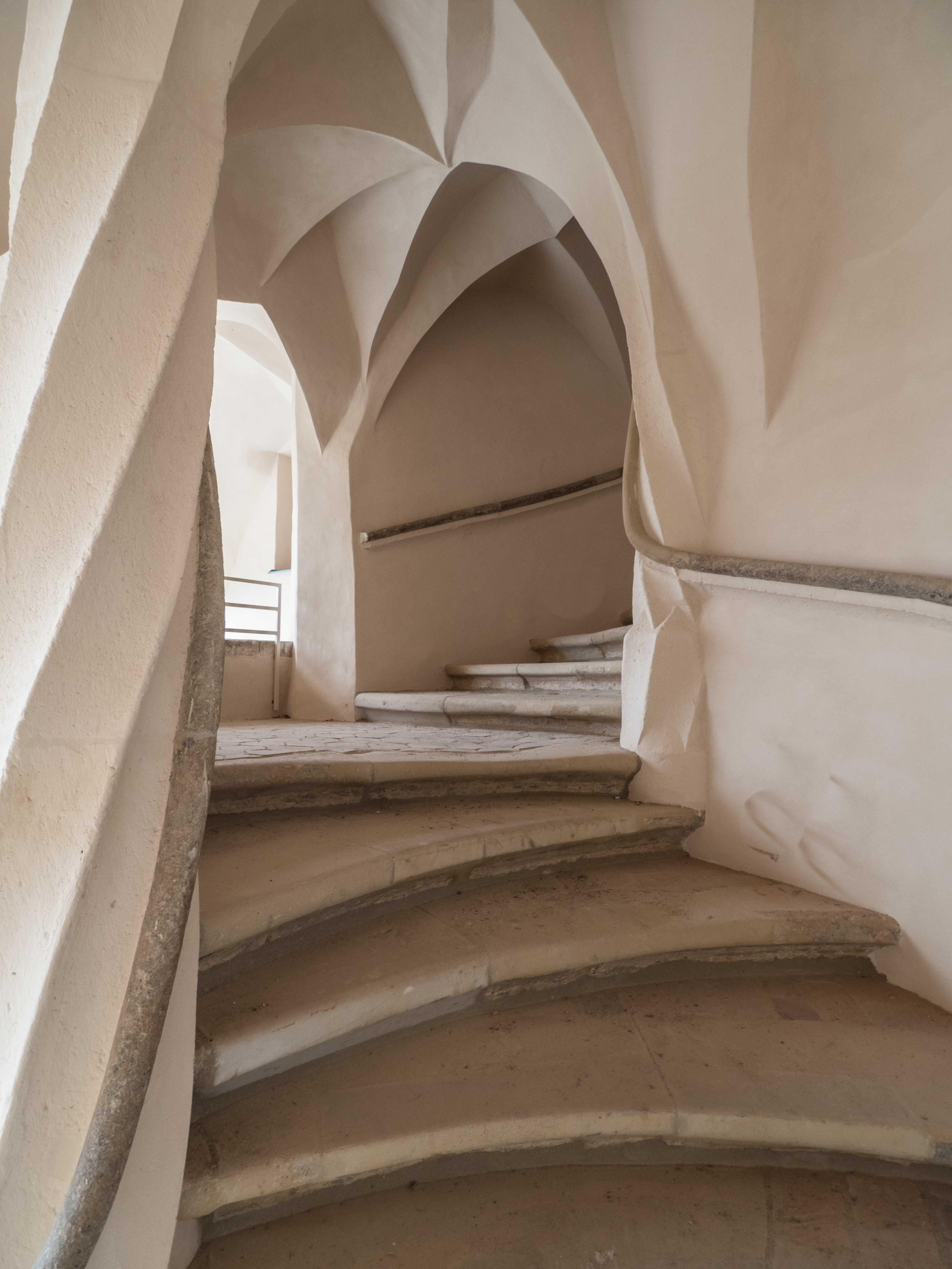 Südliches Treppenhaus. Das Schloss Wittenberg wurde ab 1489 unter Kurfürst Friedrich dem Weisen von Sachsen als Residenzschloss errichtet